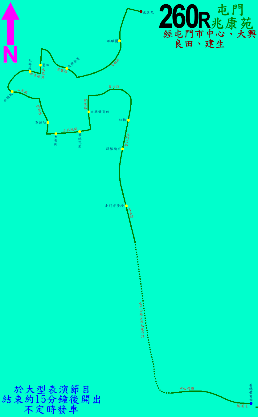 中文（香港）: 九巴260R線的走線圖